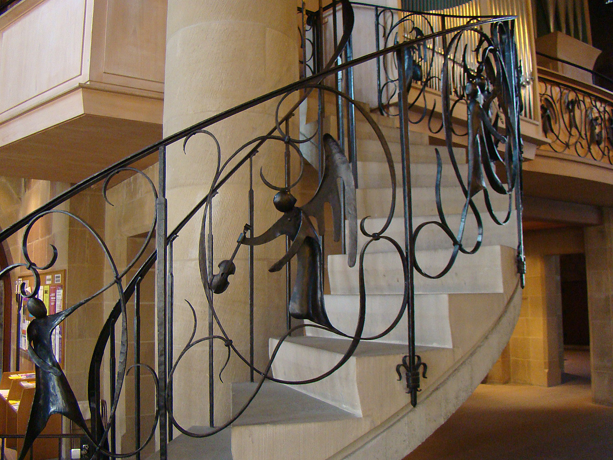 Treppengeländer von Werner Holzbächer in der Kilianskirche in Heilbronn.